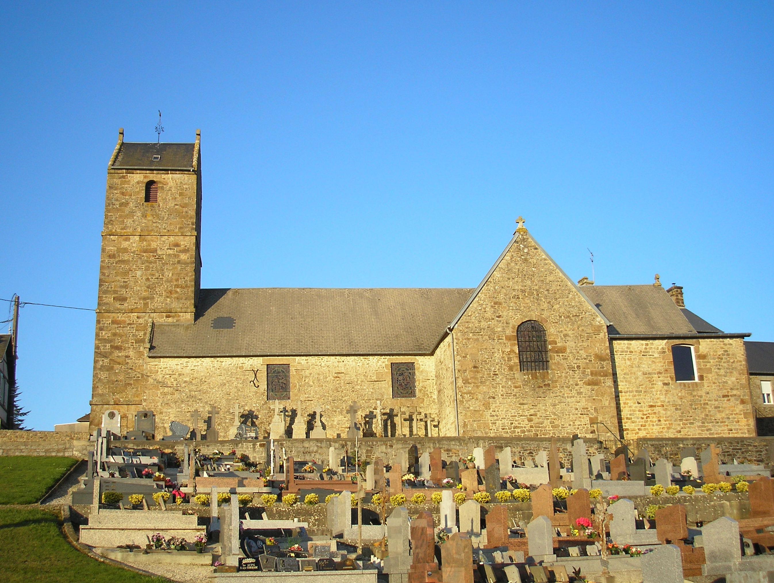 Saint-Brice-de-Landelles (Normandie, France). L'église Saint-Brice.